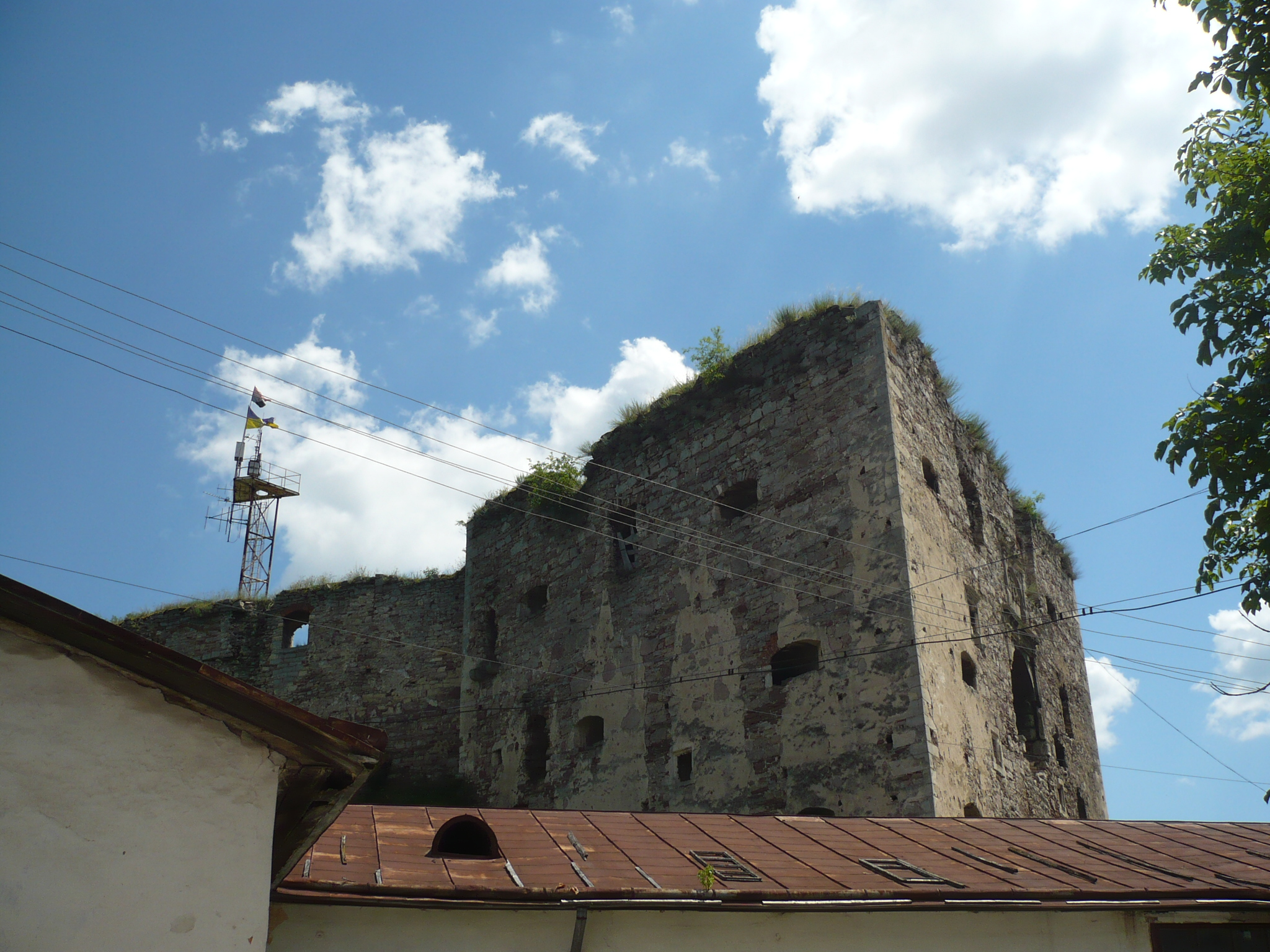 Jazłowiec. Zamek